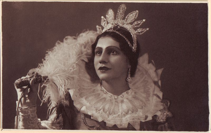 Jadvyga Kutkuvienė-Vencevičaitė (1898 m. sausio 25 d. Žiogų dvaras, Skapiškio valsčius – 1984 m. balandžio 27 d. Čikaga) – Lietuvos dainininkė (mecosopranas). Fotonuotraukoje Jadvyga Vencevičaitė - Marina Mnišek vaidmuo Modesto Musorgskio operoje "Borisas Godunovas".